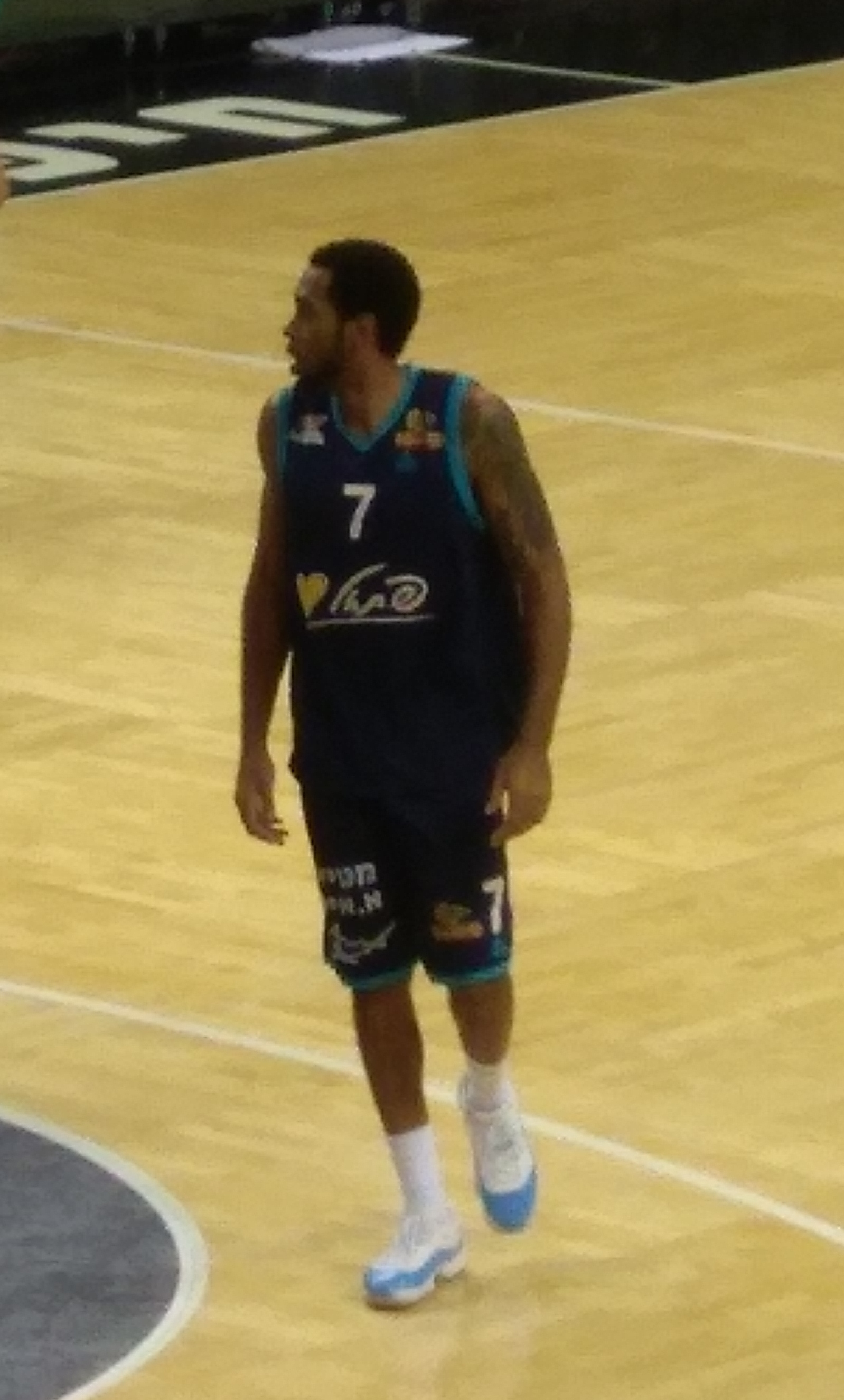 דרווין קיצ'ן, 2018